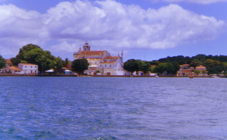 Tirei esta foto já tem 3 anos em um barco indo para a ilha do medo é a vista do centro da cidade de Itaparica na Baia de Todos os Santos na ilha de Itaparica — Patrimônio histórico do Brasil..